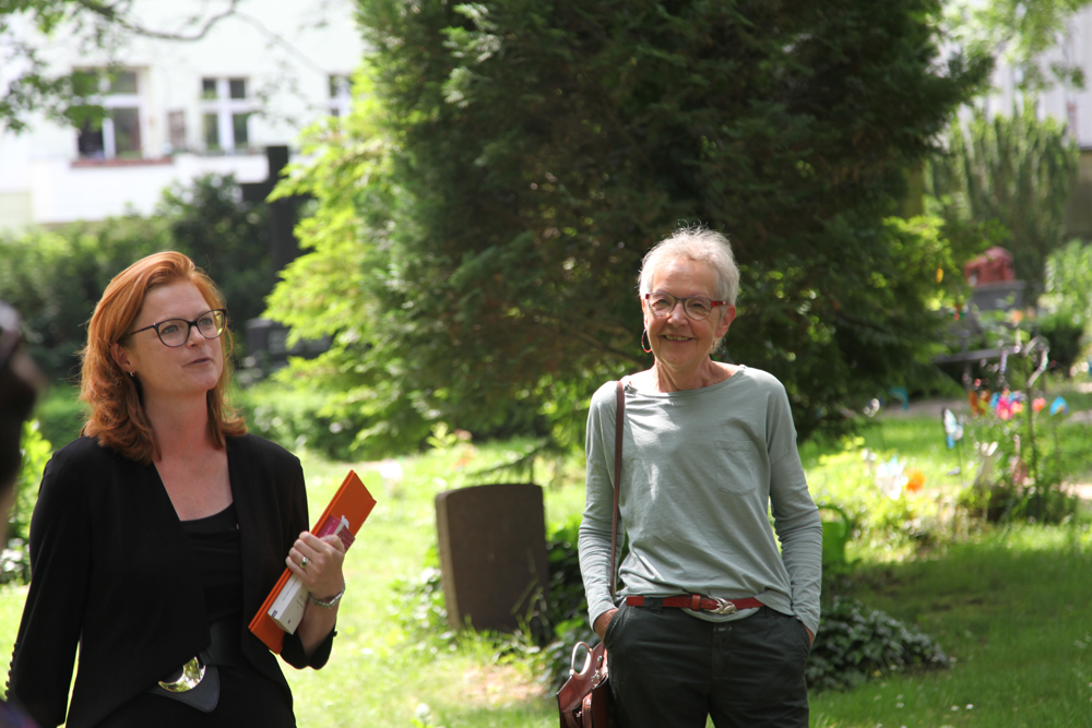 Inge von Bönninghausen (rechts) auf dem Friedhof am Grab von Hedwig Dohm